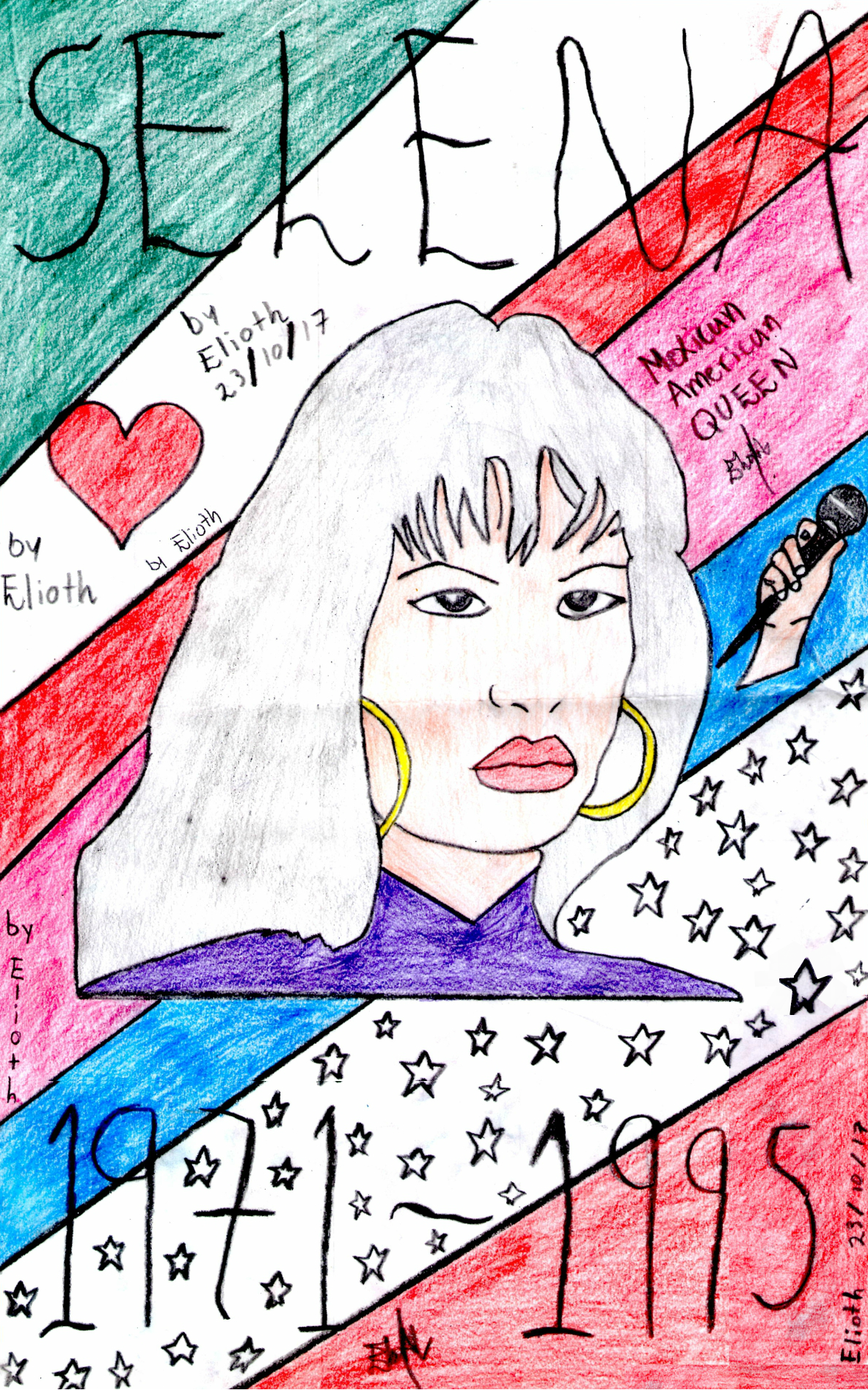 Dibujo de Selena hecho por Elioth.